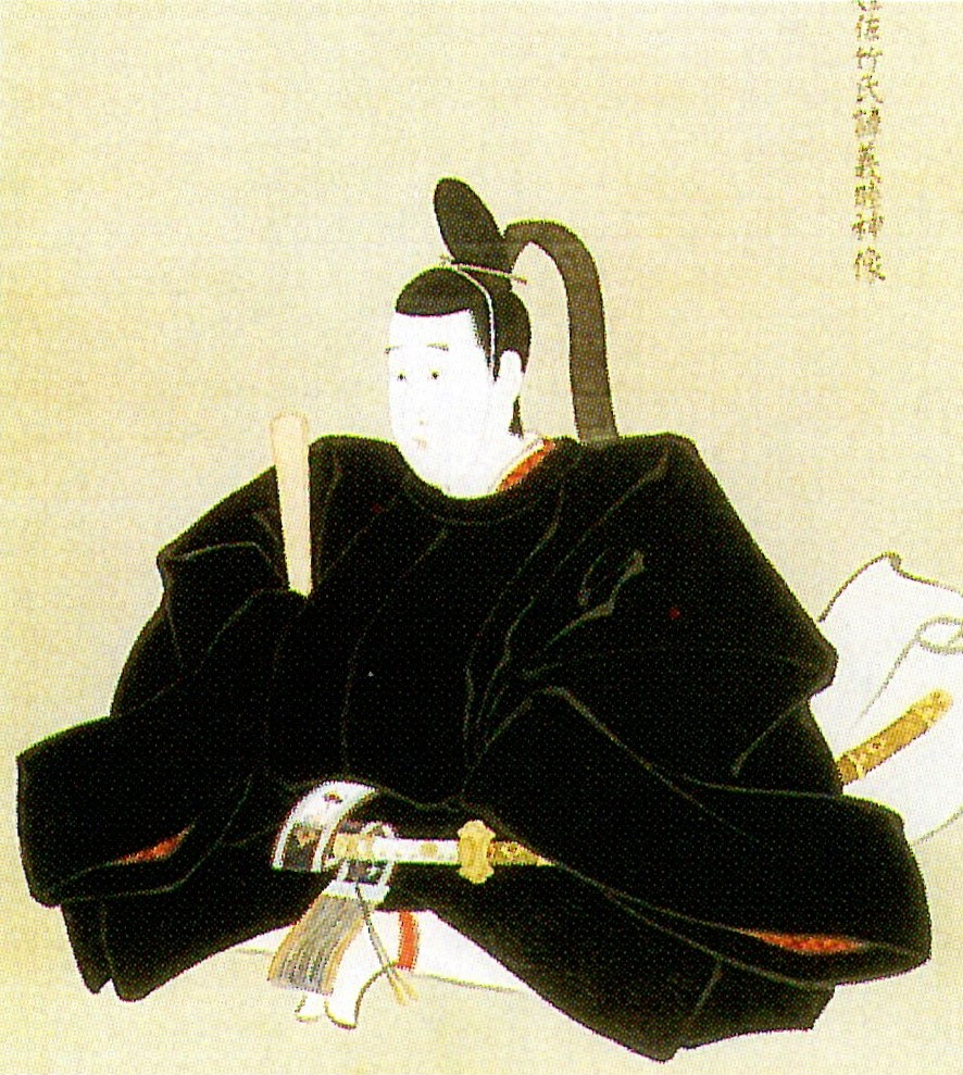 佐竹義睦の肖像。